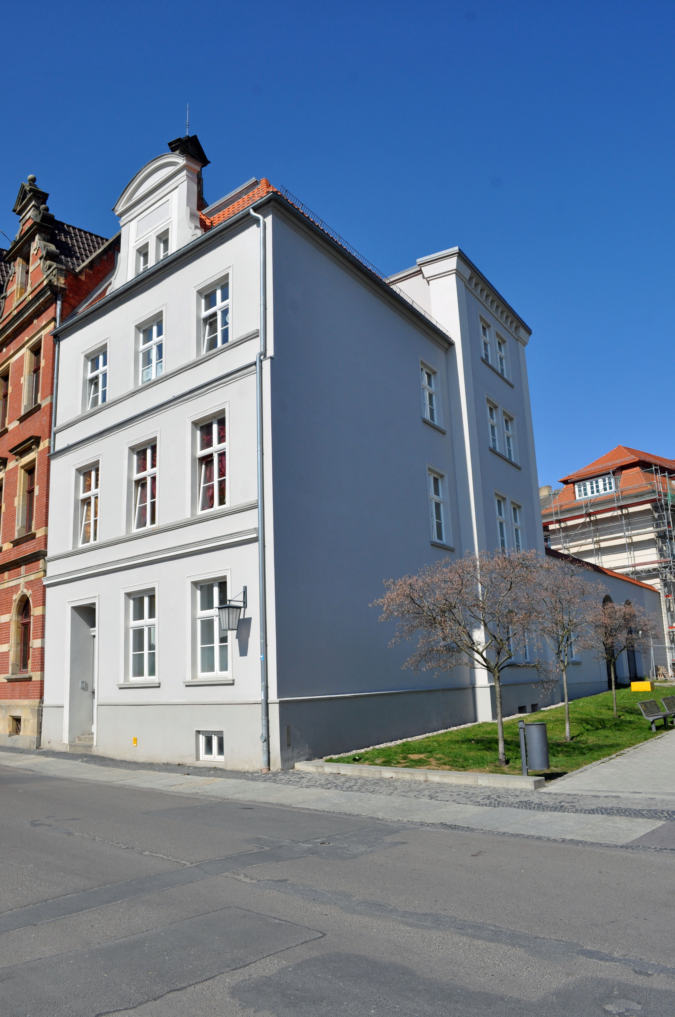 Gebäude bzw. Gebäudedetail in Stralsund. Straße und Hausnummer siehe Dateiname.